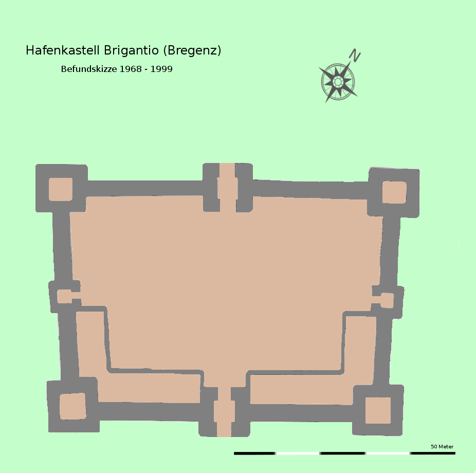 Befundskizze des spätantiken Hafenkastell von Bregenz/Bregantio (Österreich). Befunde 1968-1999.